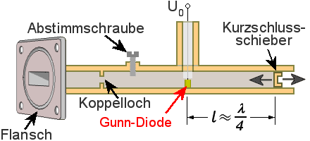 Beispiel eines Oszillators mit einem Gunn-Element in Hohlleitertechnik